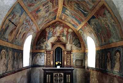 Trochtelfingen, Friedhofskapelle St. Erhard